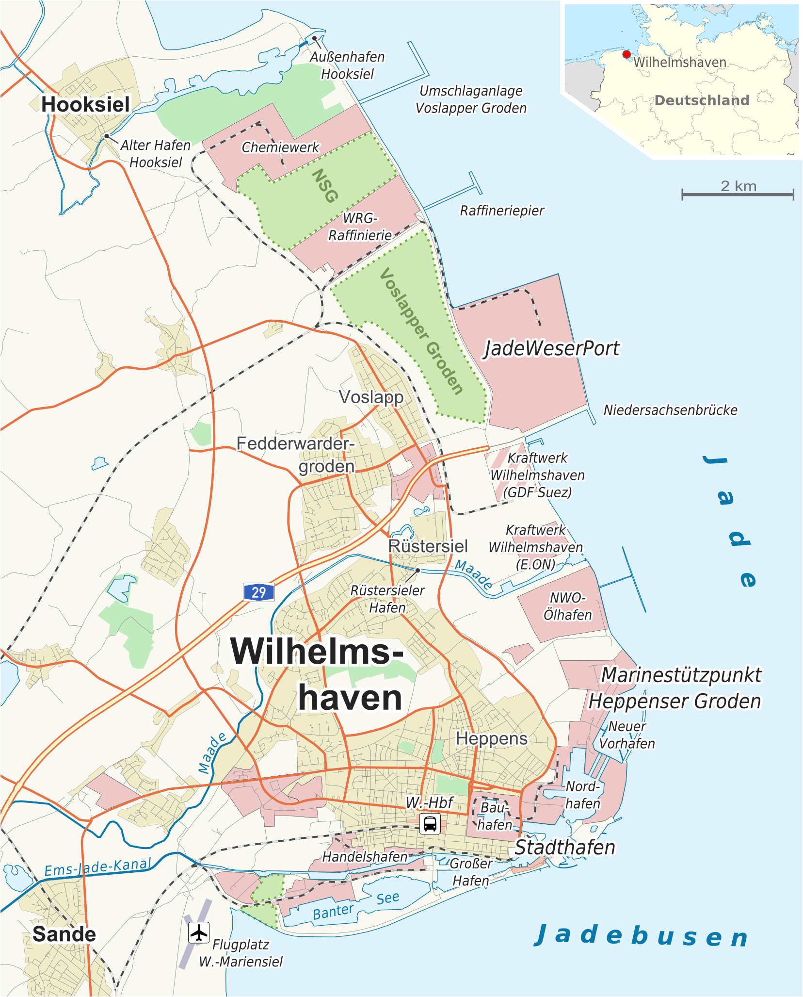 Übersichtskarte Häfen in Wilhelmshaven